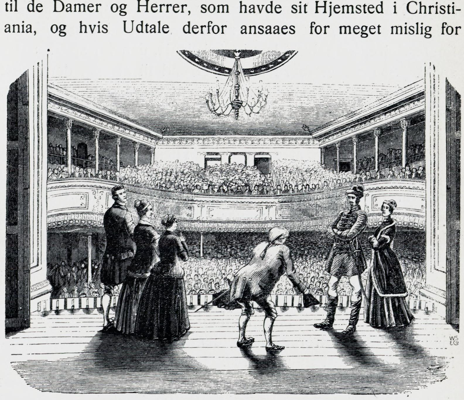 Illustrasjon hentet fra boken "En Christianiensers Erindringer fra 1850- og 60-Aarene" av Nielsen, Yngvar og utgitt av Gyldendal (Kristiania, 1910). Scene af Skuespillet "Snedkerne i Lifland" paa den norske dramatiske Skoles Theater